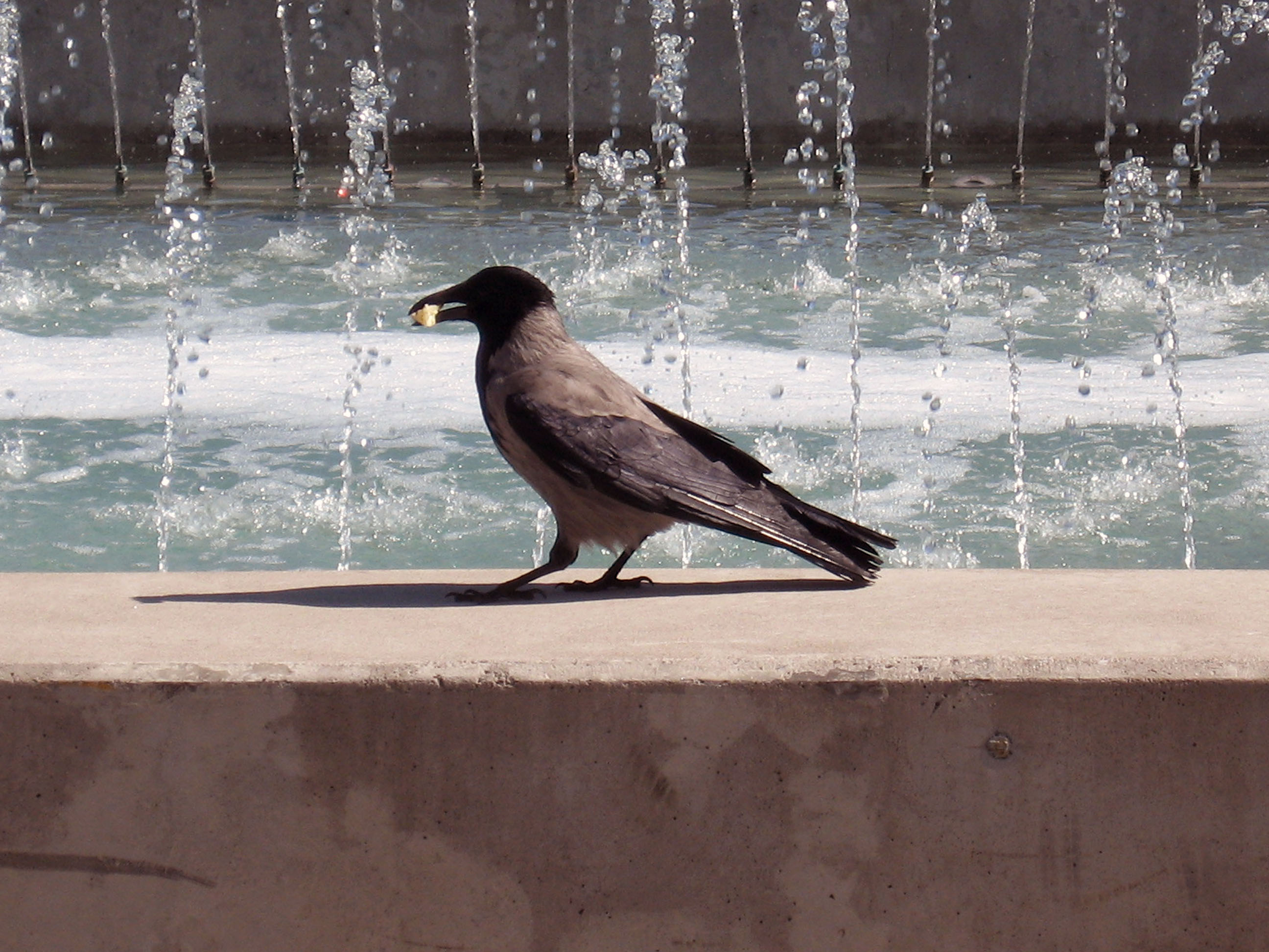 Hallvares Серая ворона Corvus corone cornix